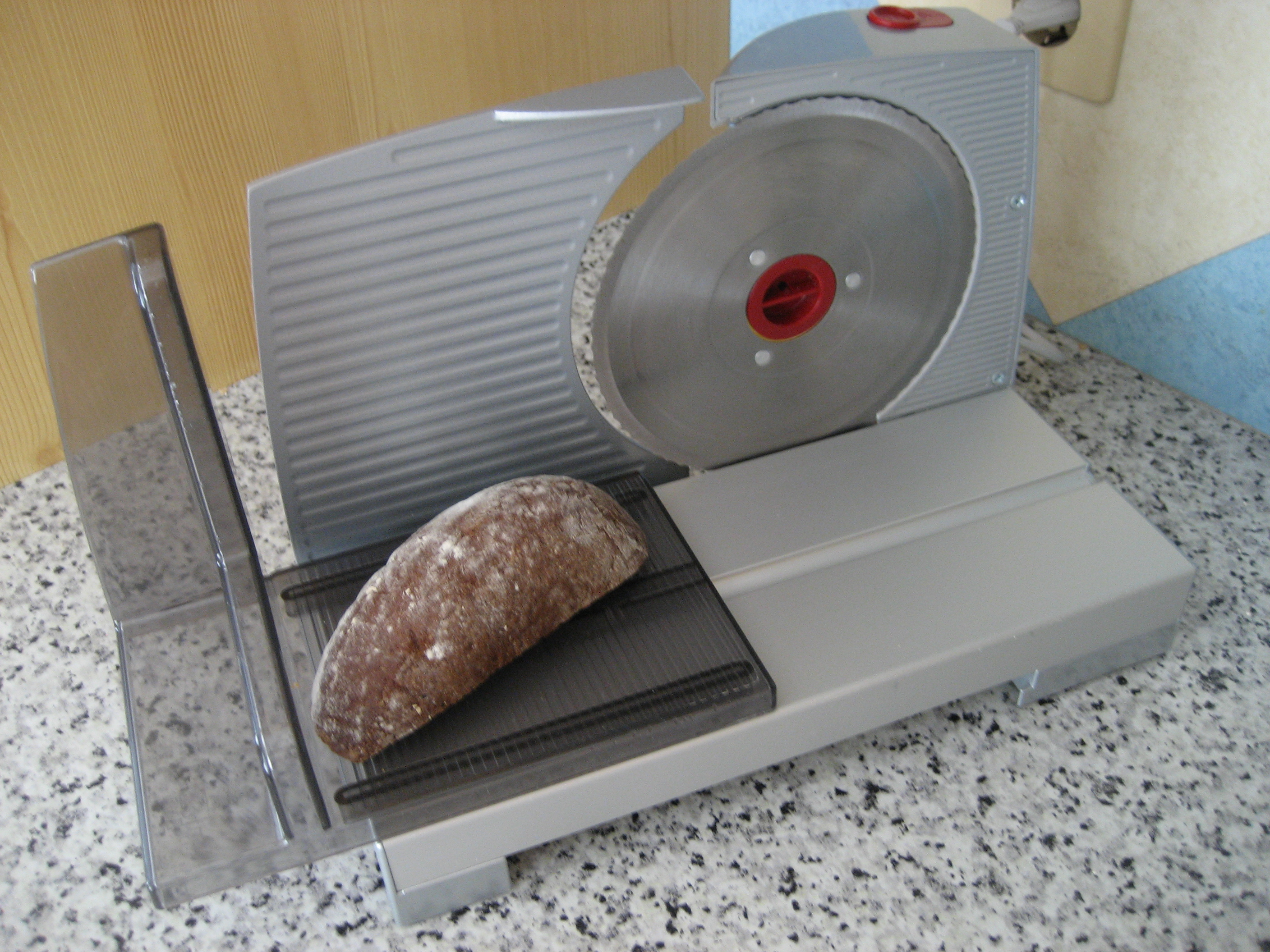 elektrische Brotschneidemaschine